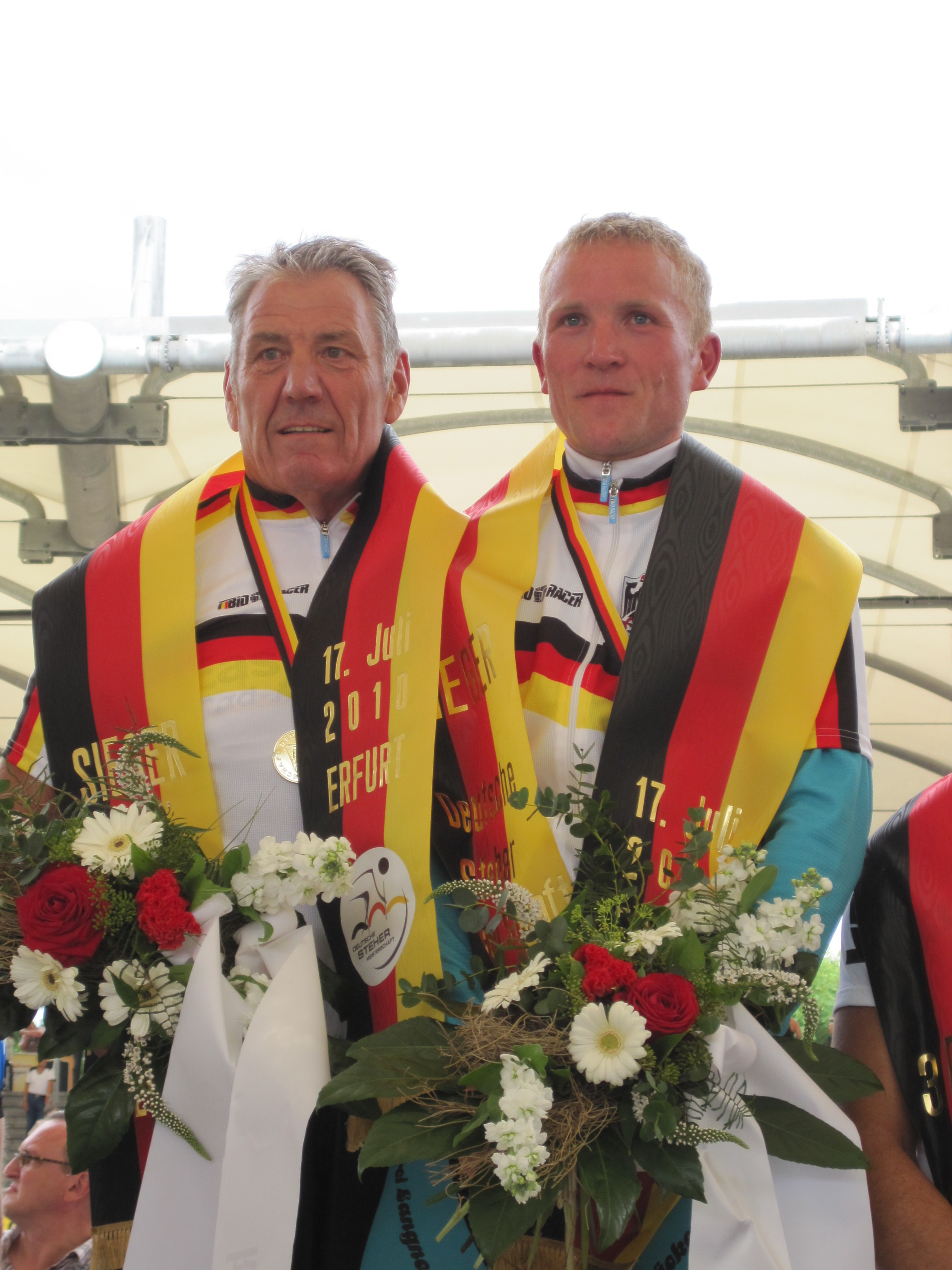 Helmut Baur, Radsportler und Schrittmacher (l.), Marcel Möbus (r.), Siegerehrung Deutsche Stehermeisterschaft 2010 in Erfurt